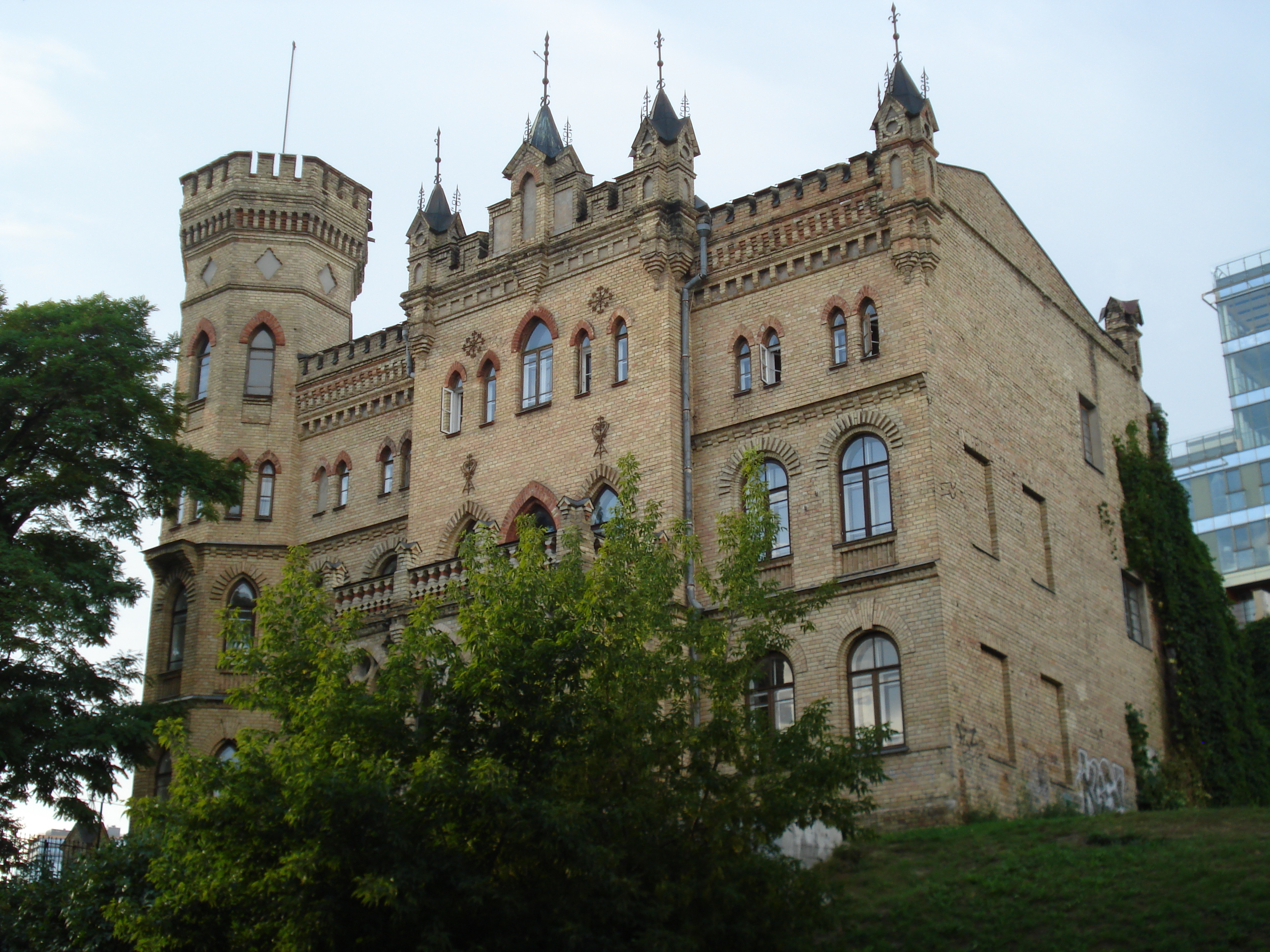 House of medician Hilary Raduszkiewicz built by Julian Januszewski (1894) in Vilnius (Kalvarijų g. 1; Architektų sąjungos būstinė)